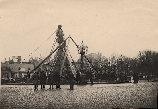 Peeter Suure ausamba lammutamine, 1922